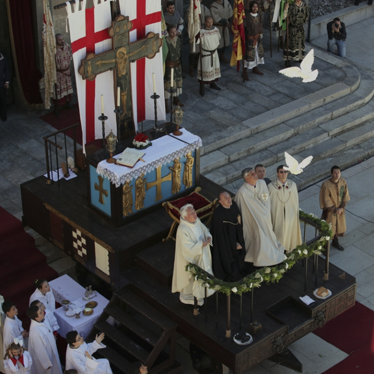 Volo delle tre colombe - Palio di Legnano 2013